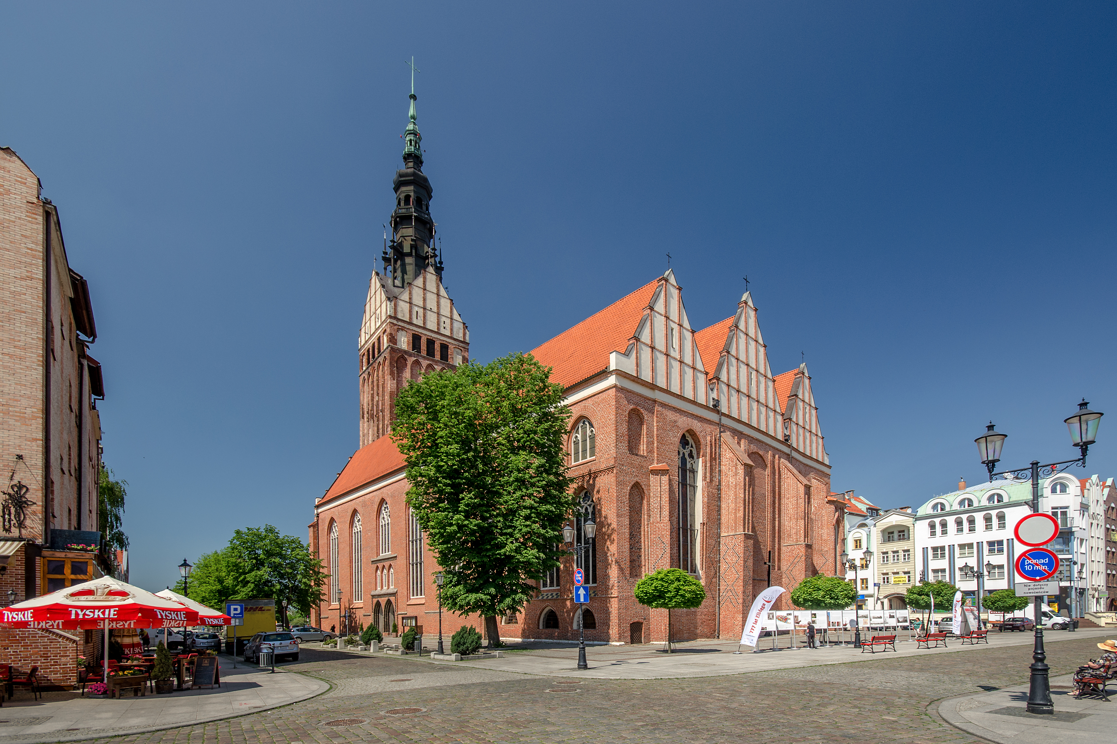 Elbląg, kościół par., ob. katedra p.w. św. Mikołaja, 1226, 1340-1380, 1953-1968